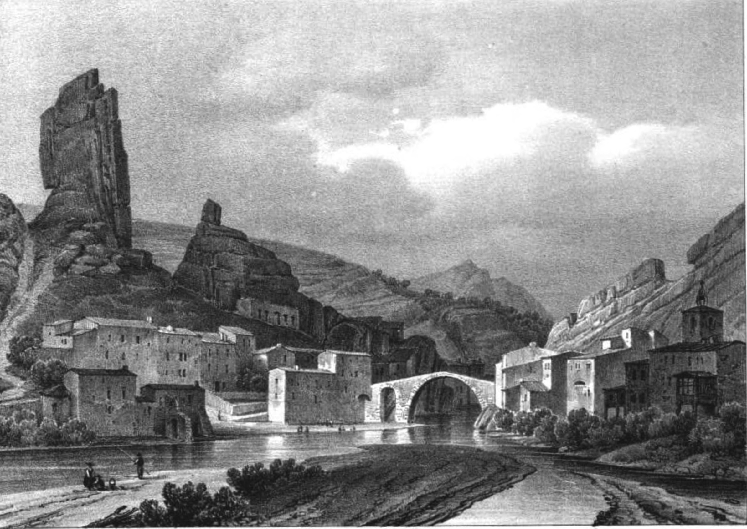 Les Pilles, Drome